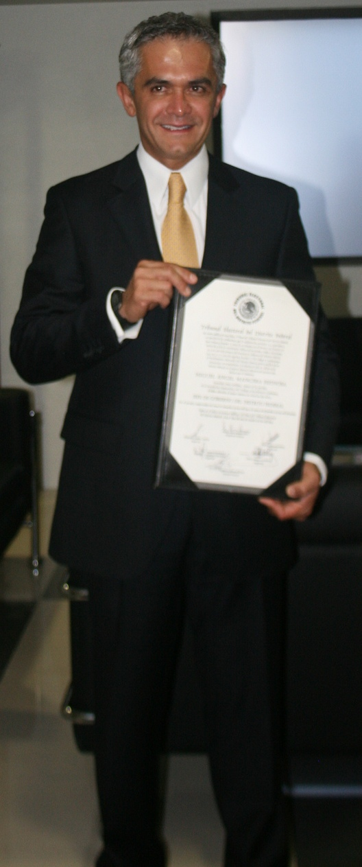 21008. México; D.F.- Entrega de constancia de Jefe de Gobierno Electo. En la imagen el DR. Miguel Ángel Mancera.